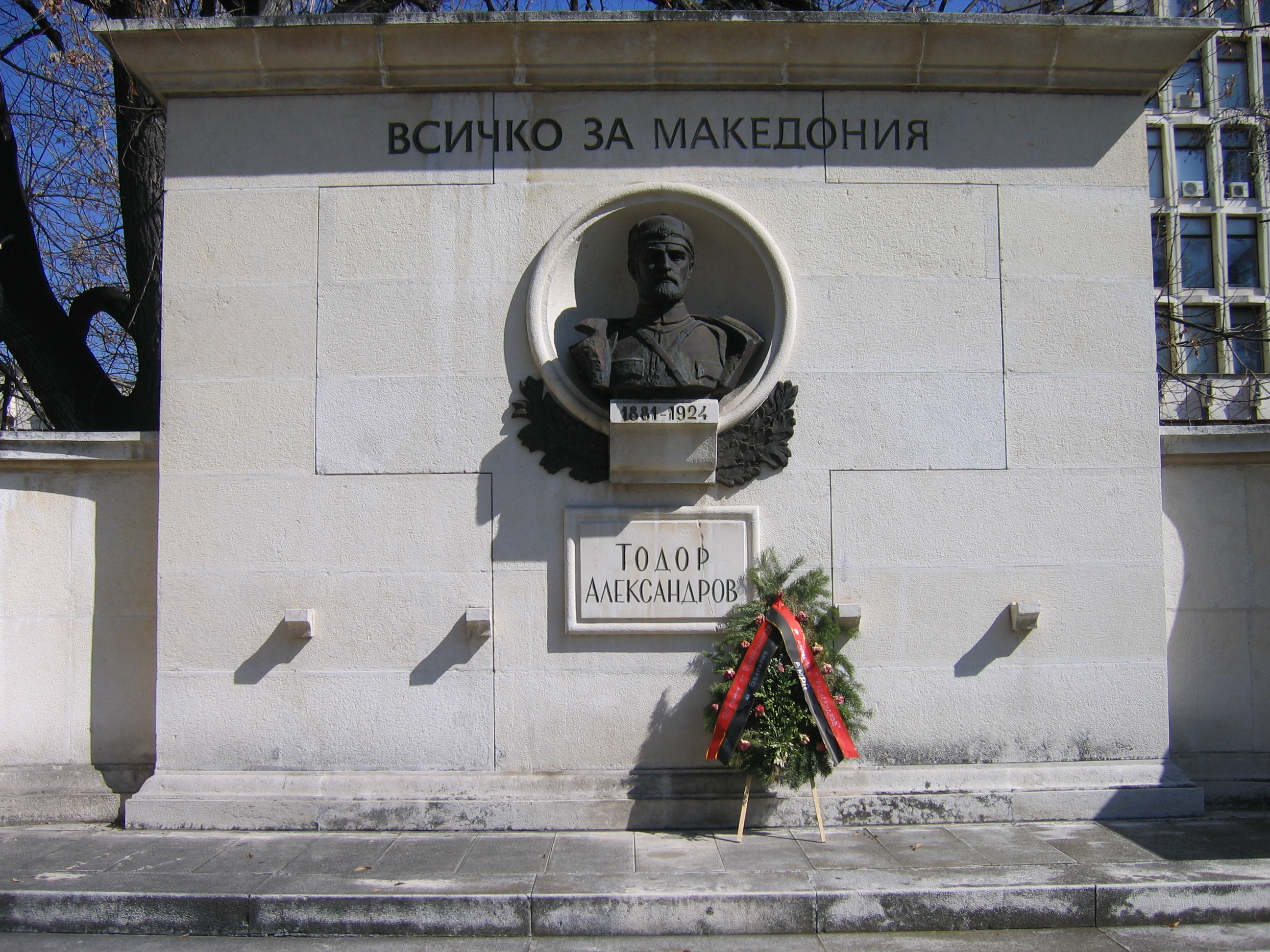 Паметник на Тодор Александров, Кюстендил, България.